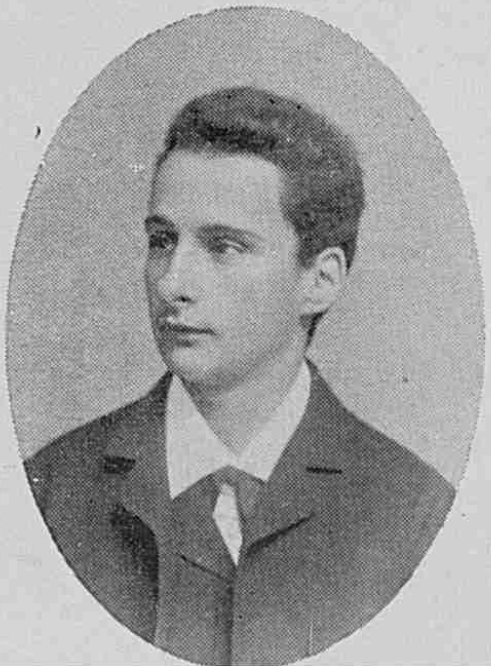 Vintilă Brătianu (România) la vârsta de şaisprezece ani